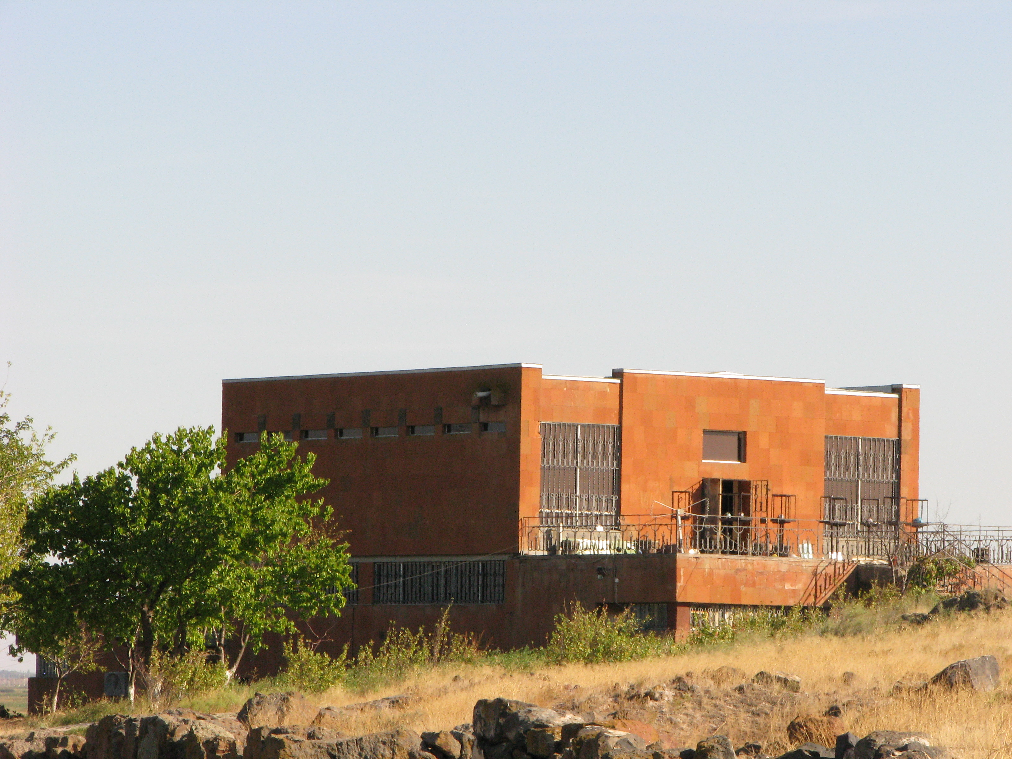 Մեծամորի թանգարանի շենքը 93/3.1.5